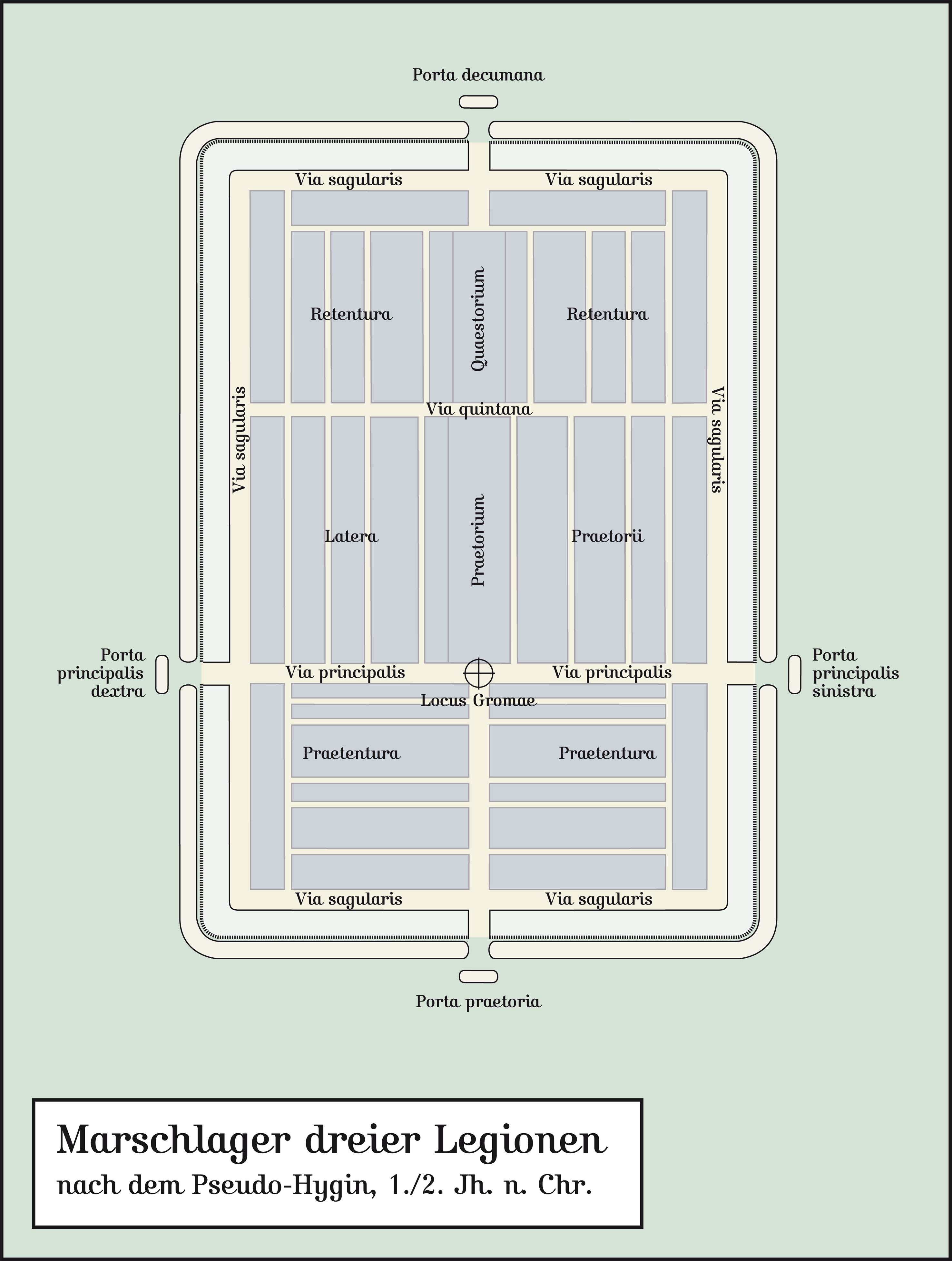 Römisches Marschlager des Pseudo-Hygin. 1./2. Jahrhundert n. Chr. Hergestellt am Macintosh unter Macromedia Freehand MX; abgespeichert für Wikipedia unter Adobe Photoshop CS 2.